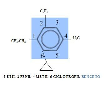 Nombre de un polisustituido del benceno atendiendo a su nomenclatura